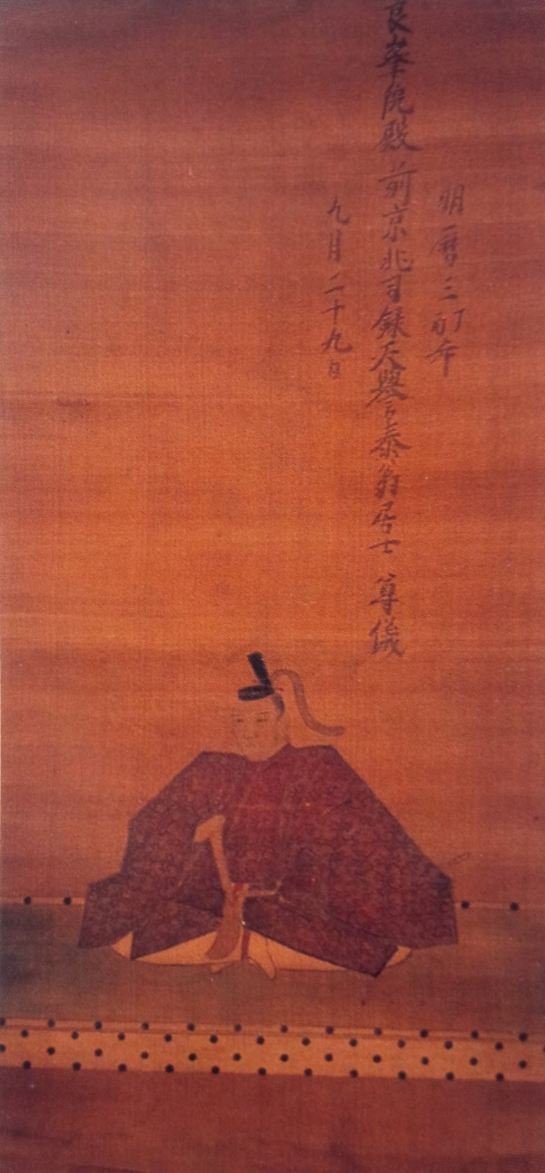 安藤重長の肖像。